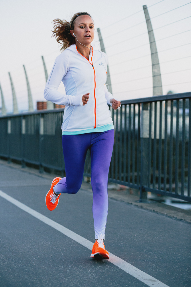 Modejournalisten Sofi Fahrman.